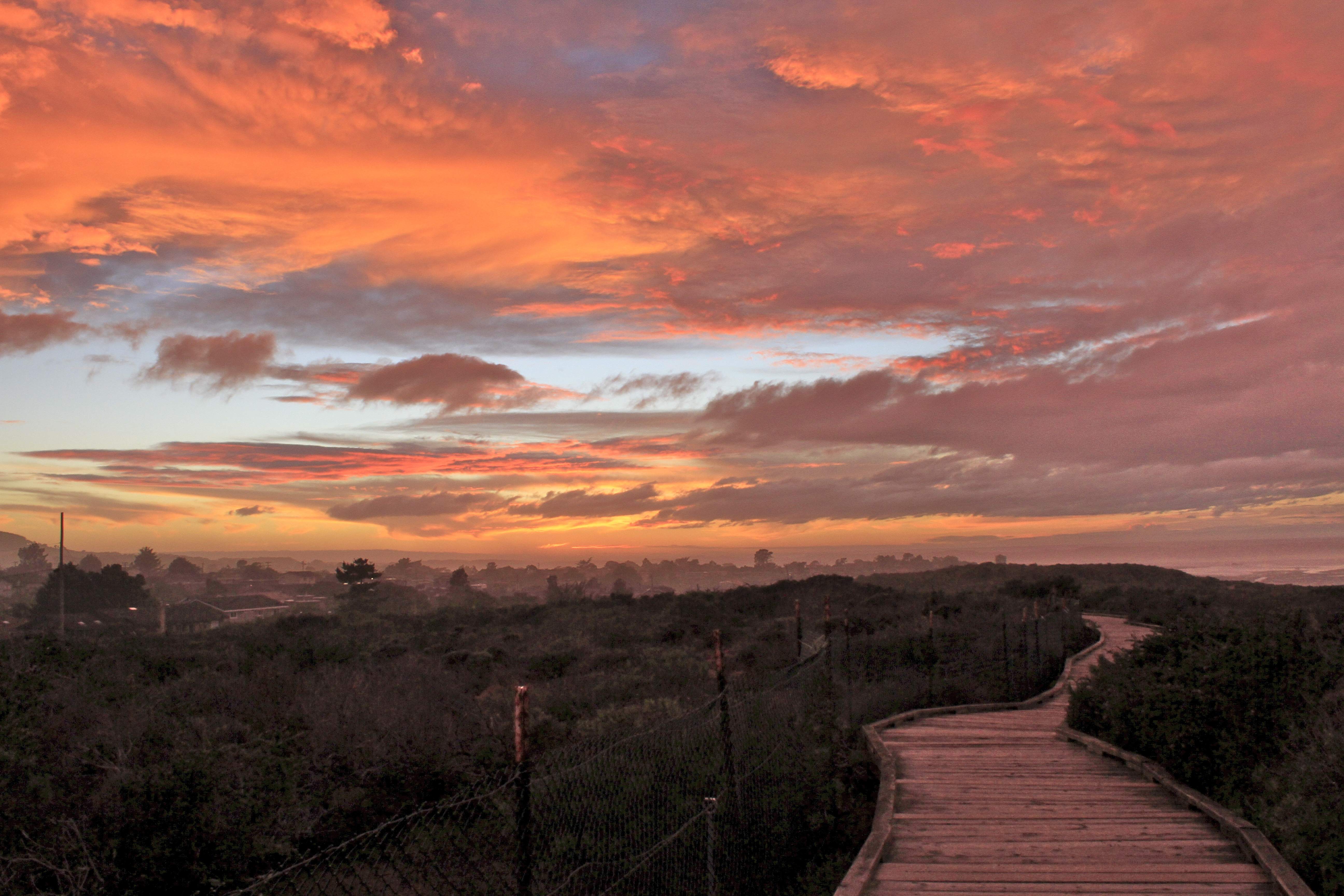 sunset from elfin forest